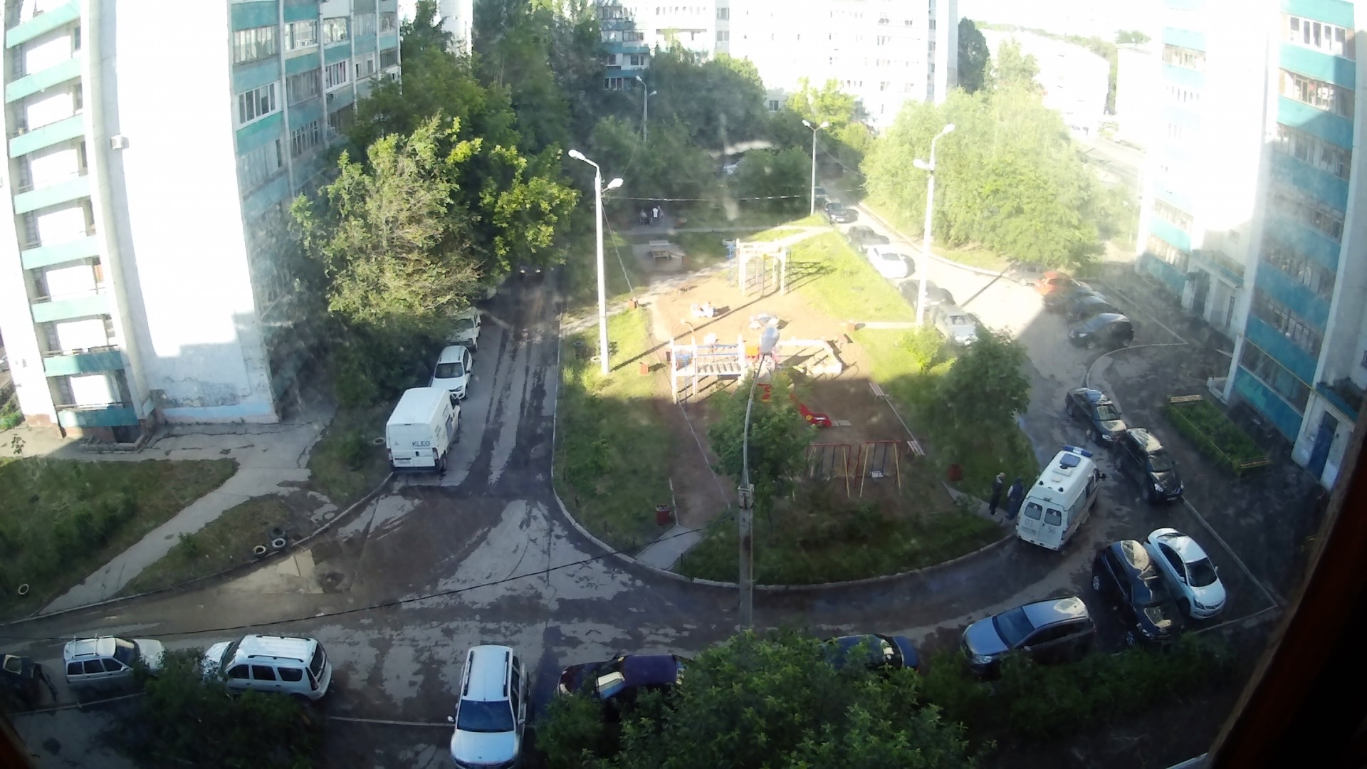 Вид с балкона во двор